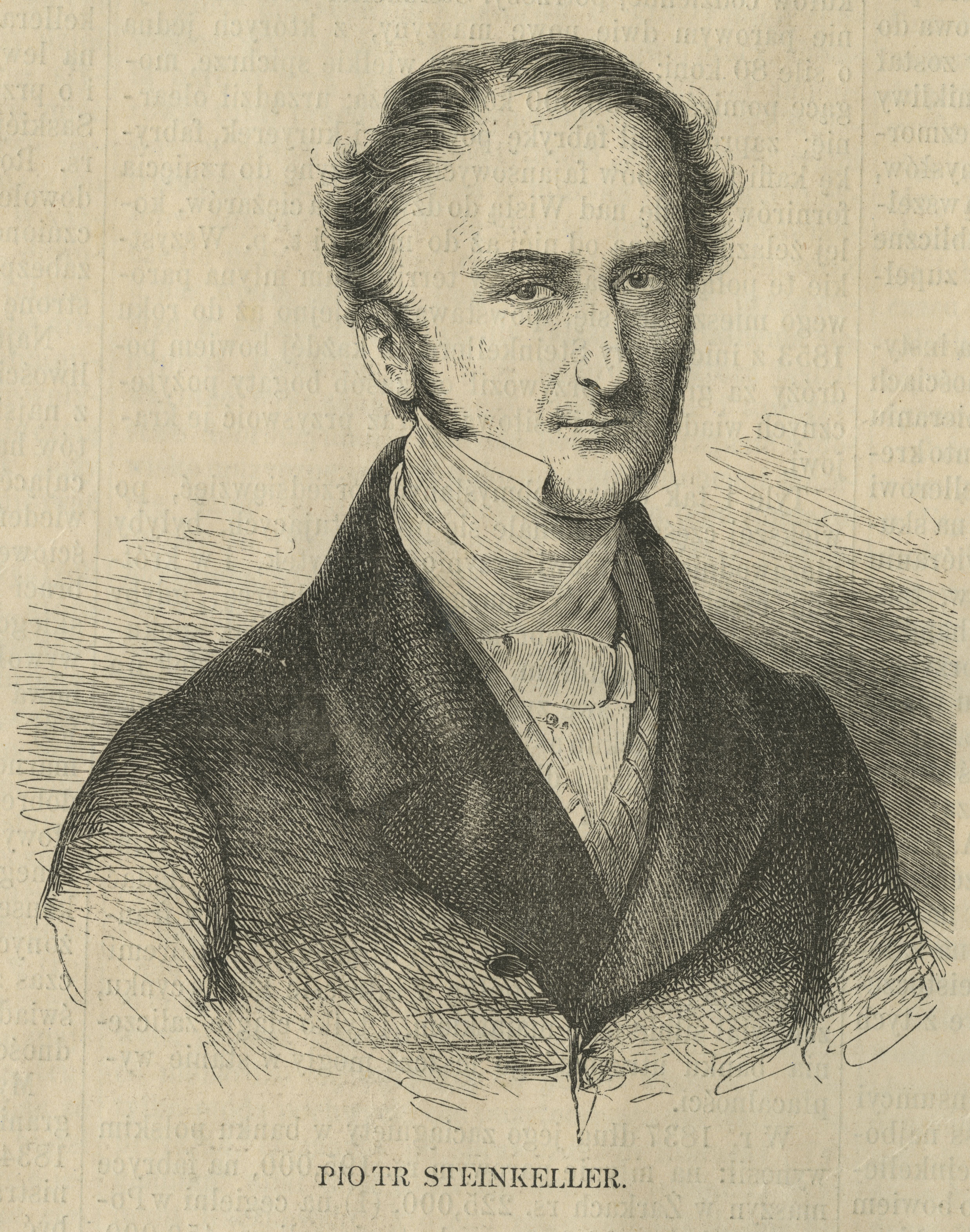 Piotr Steinkeller